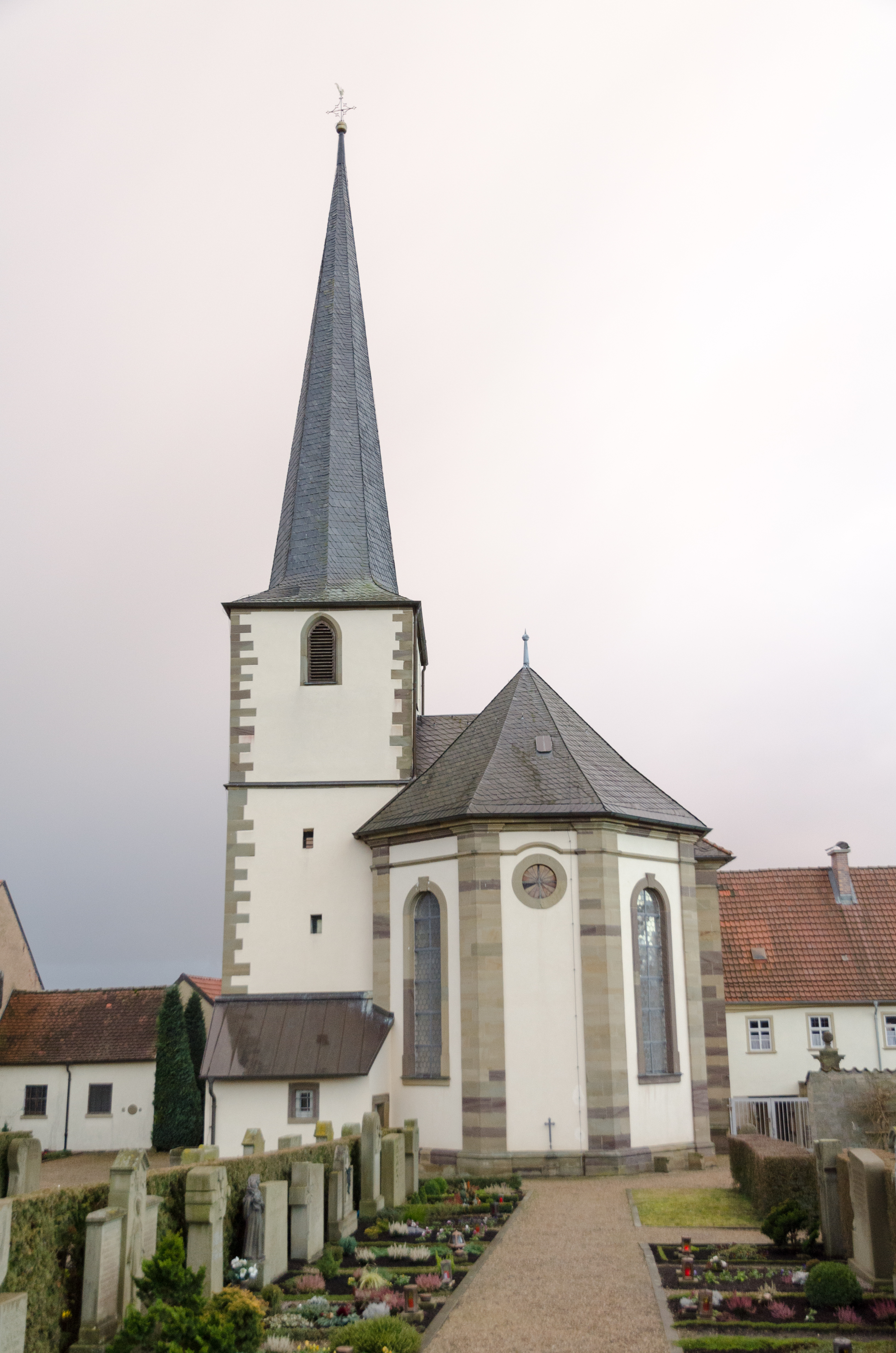 Werneck, Egenhausen, kath. Kirche